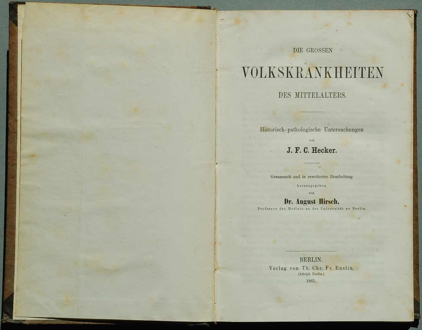 Hecker, J. F. C.: Die grossen Volkskrankheiten des Mittelalters. Historisch-pathologische Untersuchungen von J. F. C. Hecker. Gesammelt und in erweiterter Bearbeitung herausgegeben von Dr. August Hirsch, Professor der Medicin an der Universität zu Berlin. Berlin: F. Enslin 1865, VII Seiten + 1 Seite Inhaltsverzeichnis + 432 Seiten; 1.Auflage. Justus Friedrich Carl Hecker (1795 - 1850): Seit 1834 Professor für Geschichte der Medizin in Berlin. Gilt als Begründer der "historischen Pathologie". Als einer der ersten versuchte Hecker die großen Volkskrankheiten aus einer Vielzahl körperlicher, psychischer und sozialer Faktoren zu erklären. Die posthum erschiene Sammlung früherer Einzelarbeiten, deren Titelblatt hier gezeigt wird, gilt neben seiner "Geschichte der Heilkunde" (2 Bde. 1822-29) als eines seiner beiden Hauptwerke.